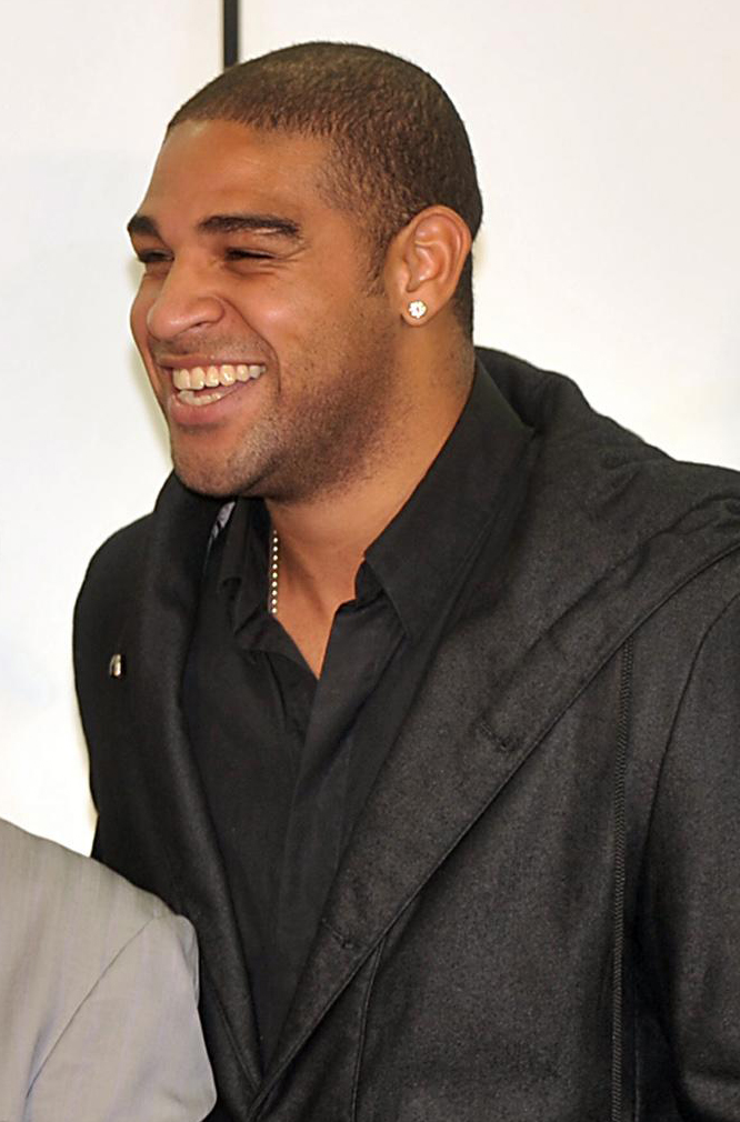 O presidente Lula recebe jogadores e dirigentes do Flamengo, campeão brasileiro de 2009, no Centro Cultural Banco do Brasil.